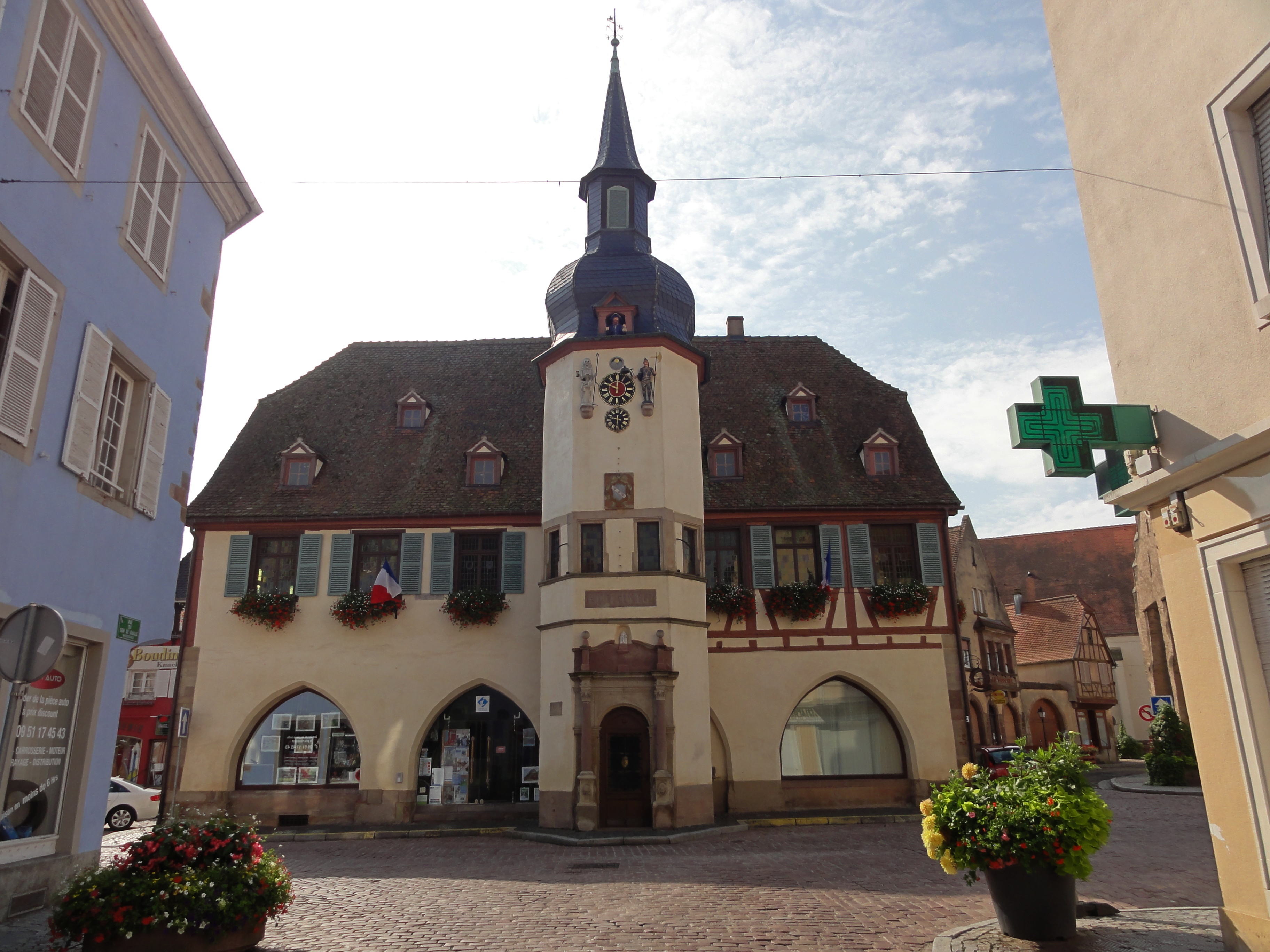 Alsace, Bas-Rhin, Benfeld, Hôtel de Ville (1619), place de la Mairie (PA00084605, IA00023505).